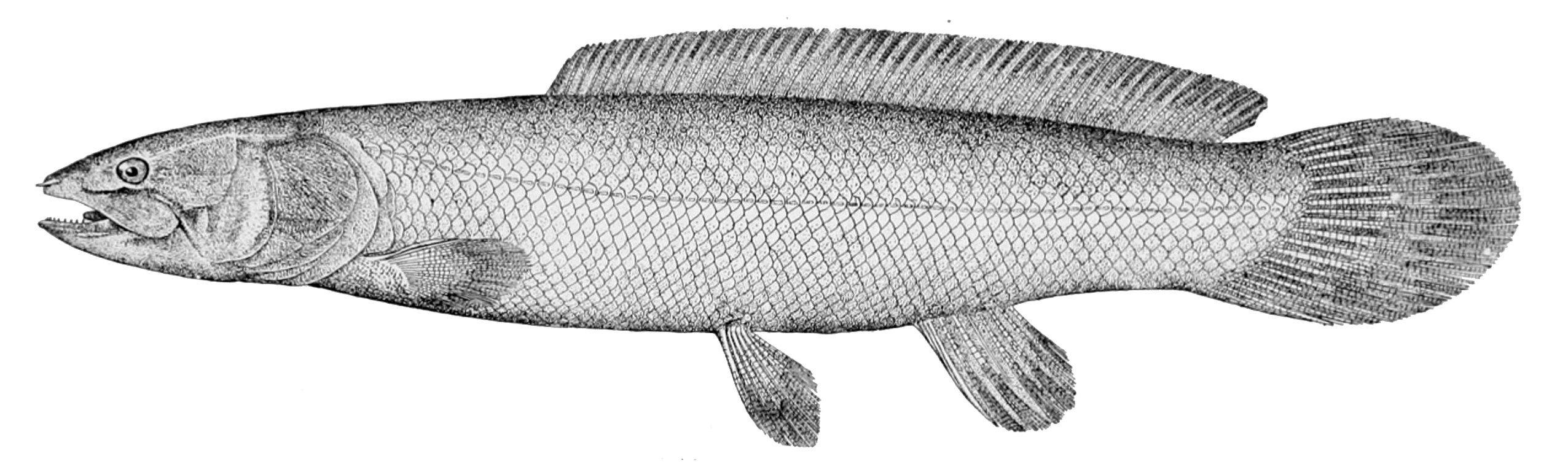 Amia calva